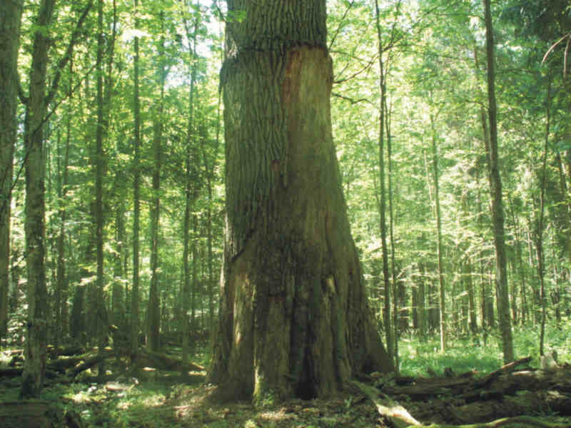 Dominator Eiche, Polen, Poland